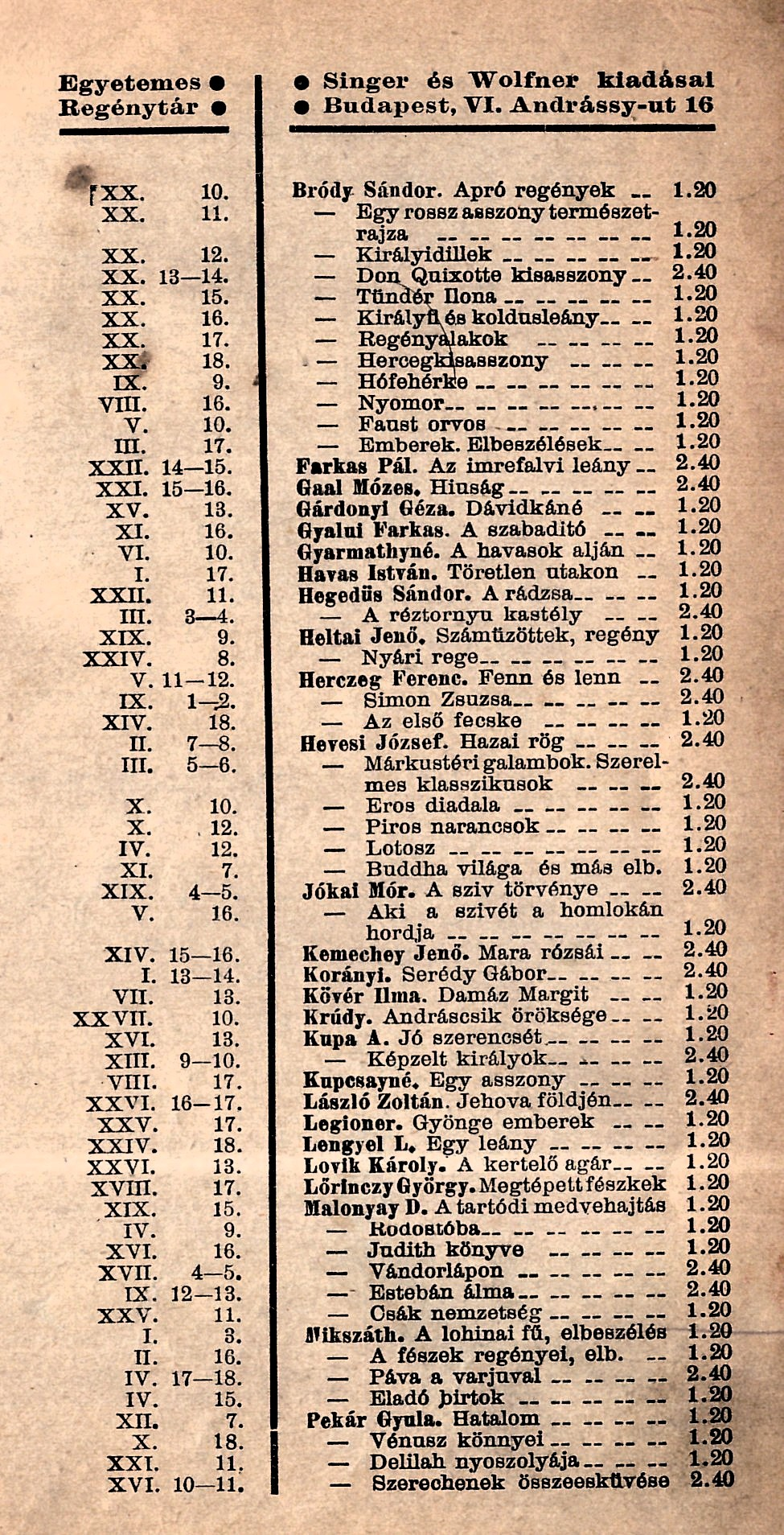 Az Egyetemes regénytár köteteinek jegyzéke (előzéklap Arthur Conan Doyle [1859-1930]: Napoleon [1911, Egyetemes regénytár] kiadásában)